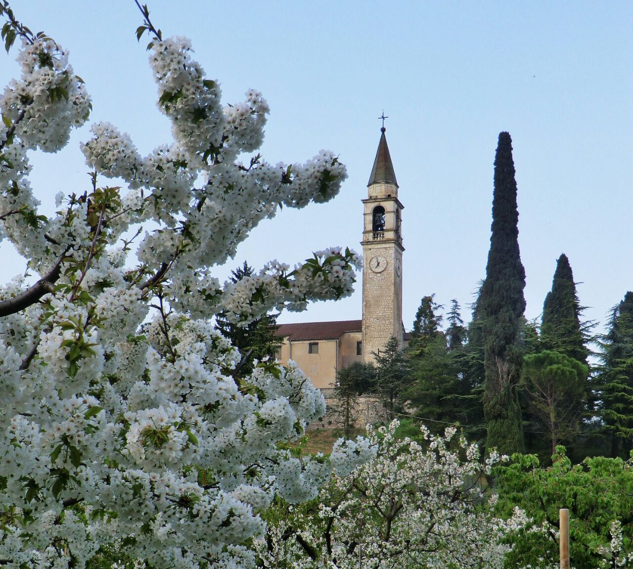 Con i ciliegi in fiore Castegnero si veste di bianco.